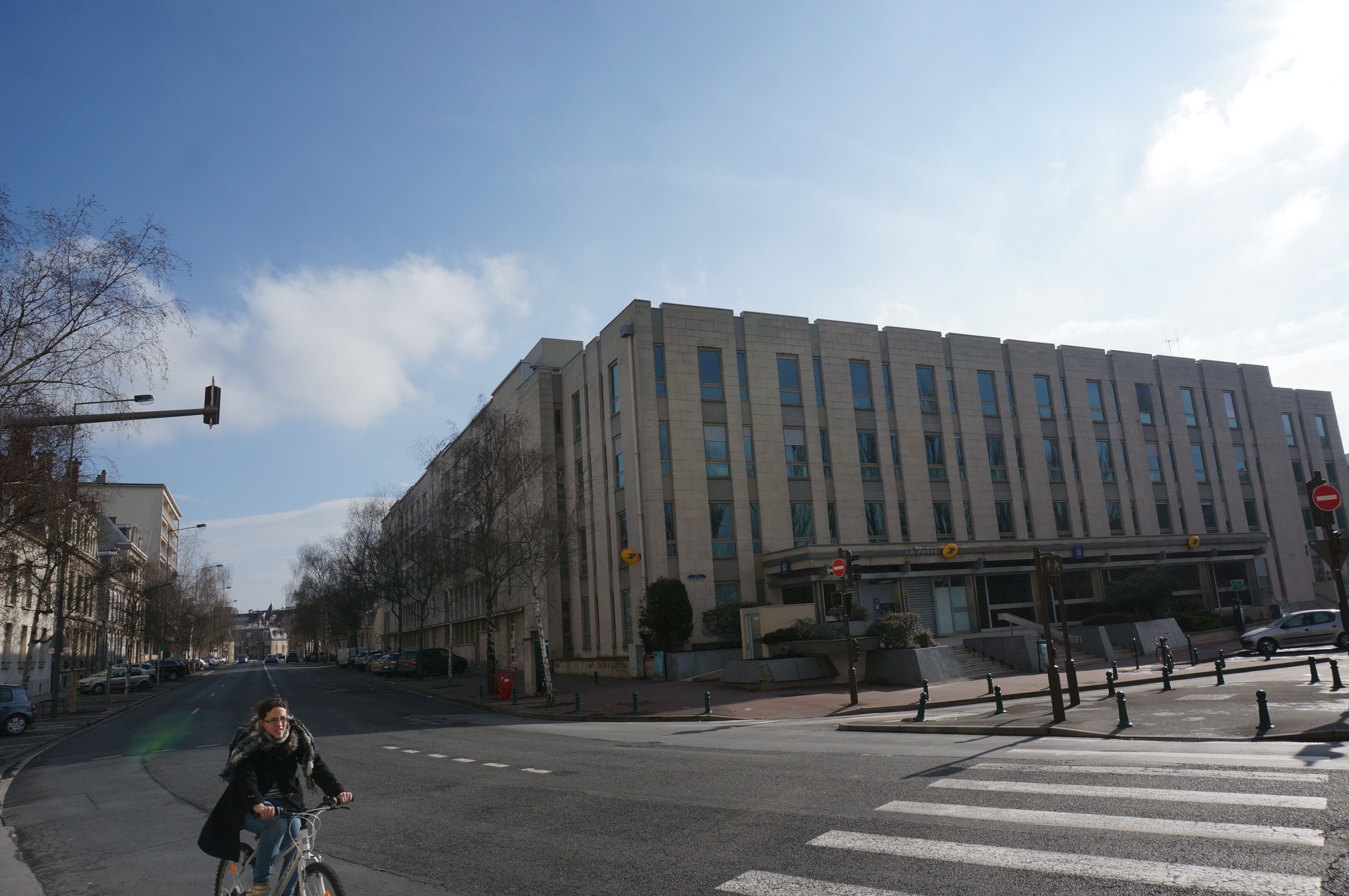 vue du Boulevard Lundy, Reims, sur la droite la Poste.